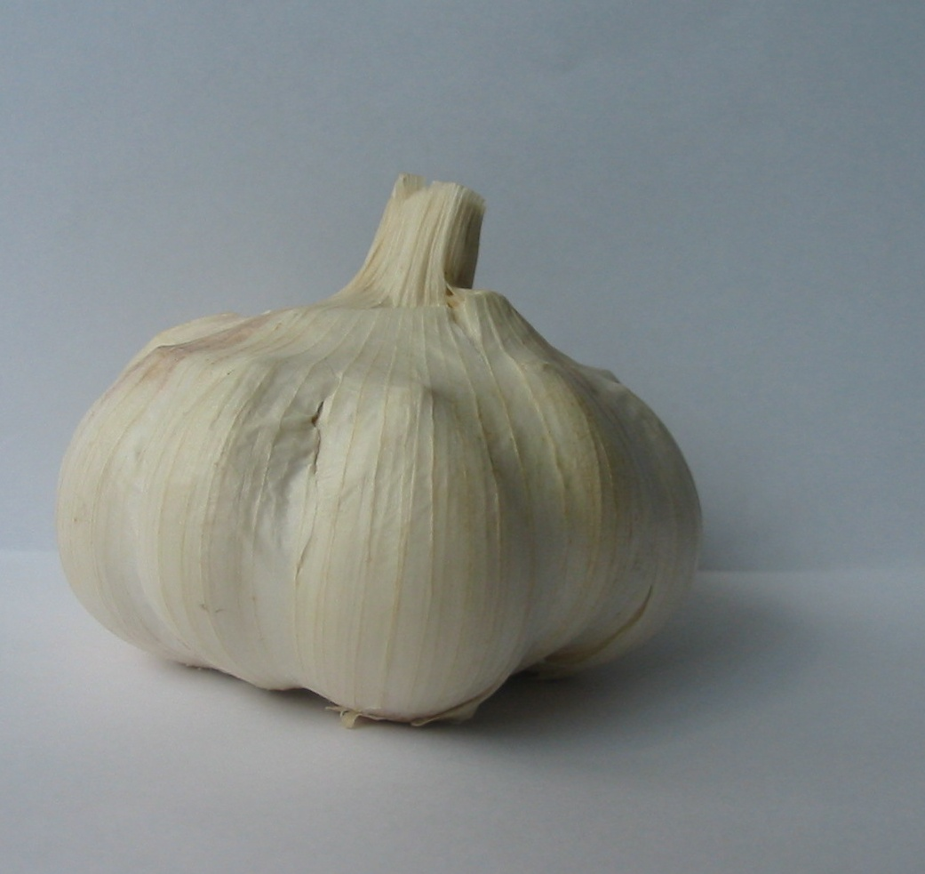 Garlic